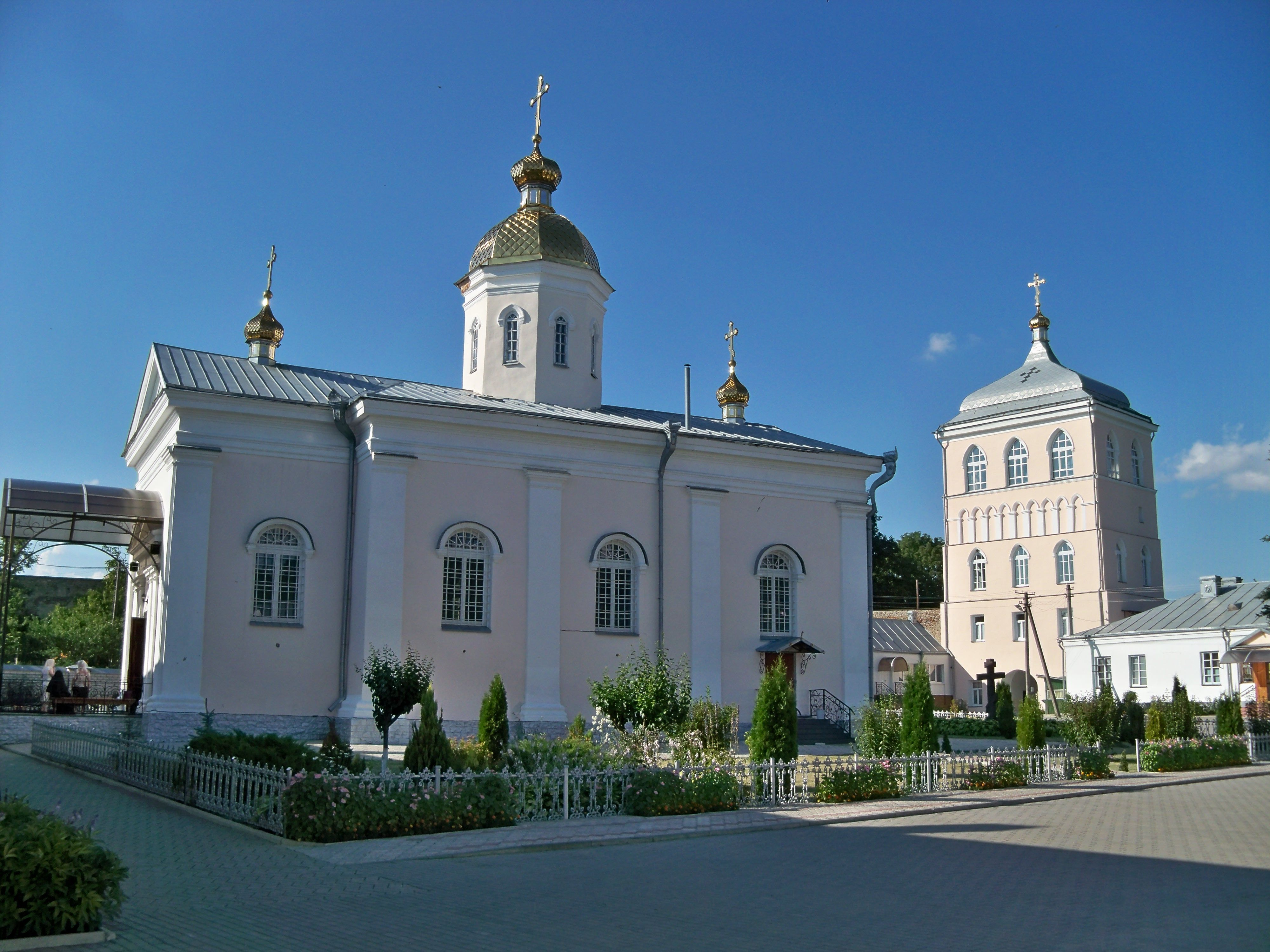 Троїцька церква (мур.), с.Дермань